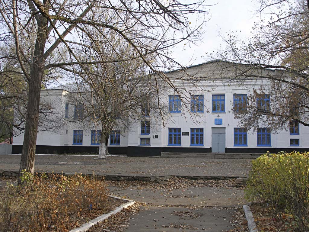 Antracitas 1. vidusskola